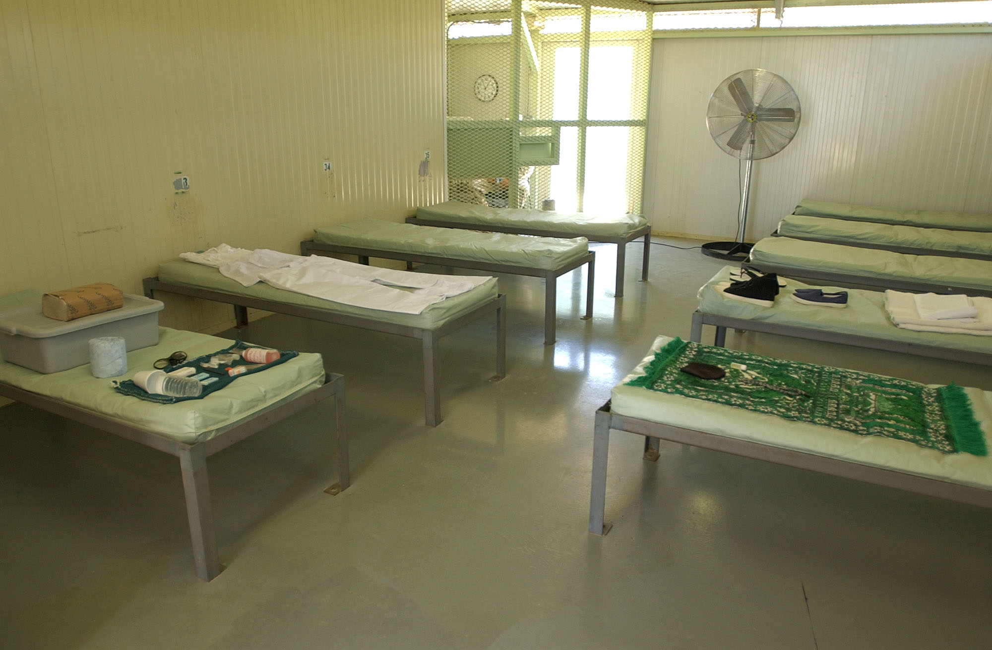 Communal barracks for "compliant" captives, camp four, Guantanamo Bay detention camps, Cuba/